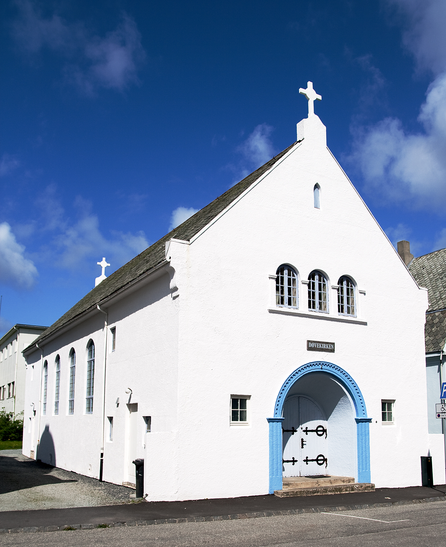 Døvekirken i Stavanger